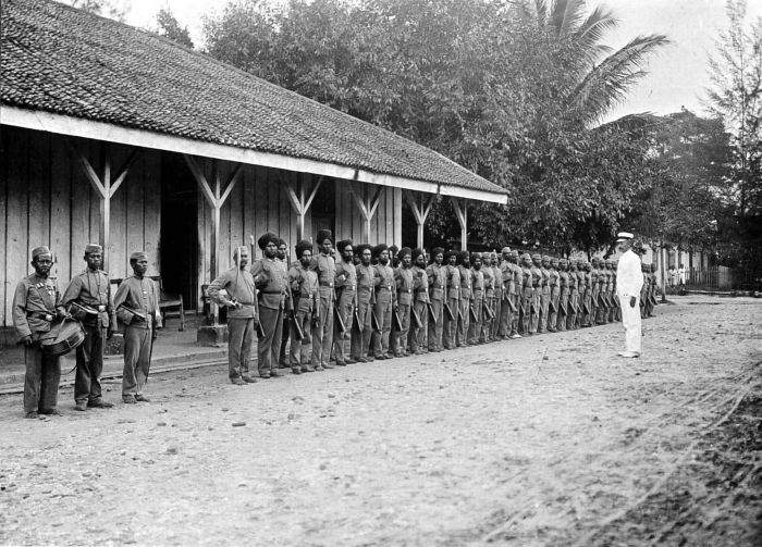 Repronegatief. Net als bij rubber was de ontwikkeling van de auto een belangrijke motor achter de enorme groei van de petroleumwinning. Zelfs tijdens de Depressie van de jaren '30 bleef de groei voortgaan. De olie werd van de bronnen via pijpleidingen geleid naar de verwerkingsplaatsen, waaronder Pangkalan Brandan (foto). De petroleumwinning en -verwerking in de Archipel waren bijna helemaal in handen van de Bataafsche Petroleum Maatschappij, een dochtermaatschappij van de Koninklijke/Shell Groep. Een alliantie die in 1907 tot stand kwam en nog steeds bestaat. 'De Koninklijke' was een machtig lichaam dat de latere premier H. Colijn onder zijn medewerkers telde. Let op de Sikh op de foto. (P. Boomgaard, 2001). Politie-oppassers van het Koninklijk Nederlands Indisch Leger te Pangkalanbrandan, Sumatra